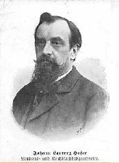 Johann Laurenz Hofer (1856 - ?), Rakouský a český novinář a politik.